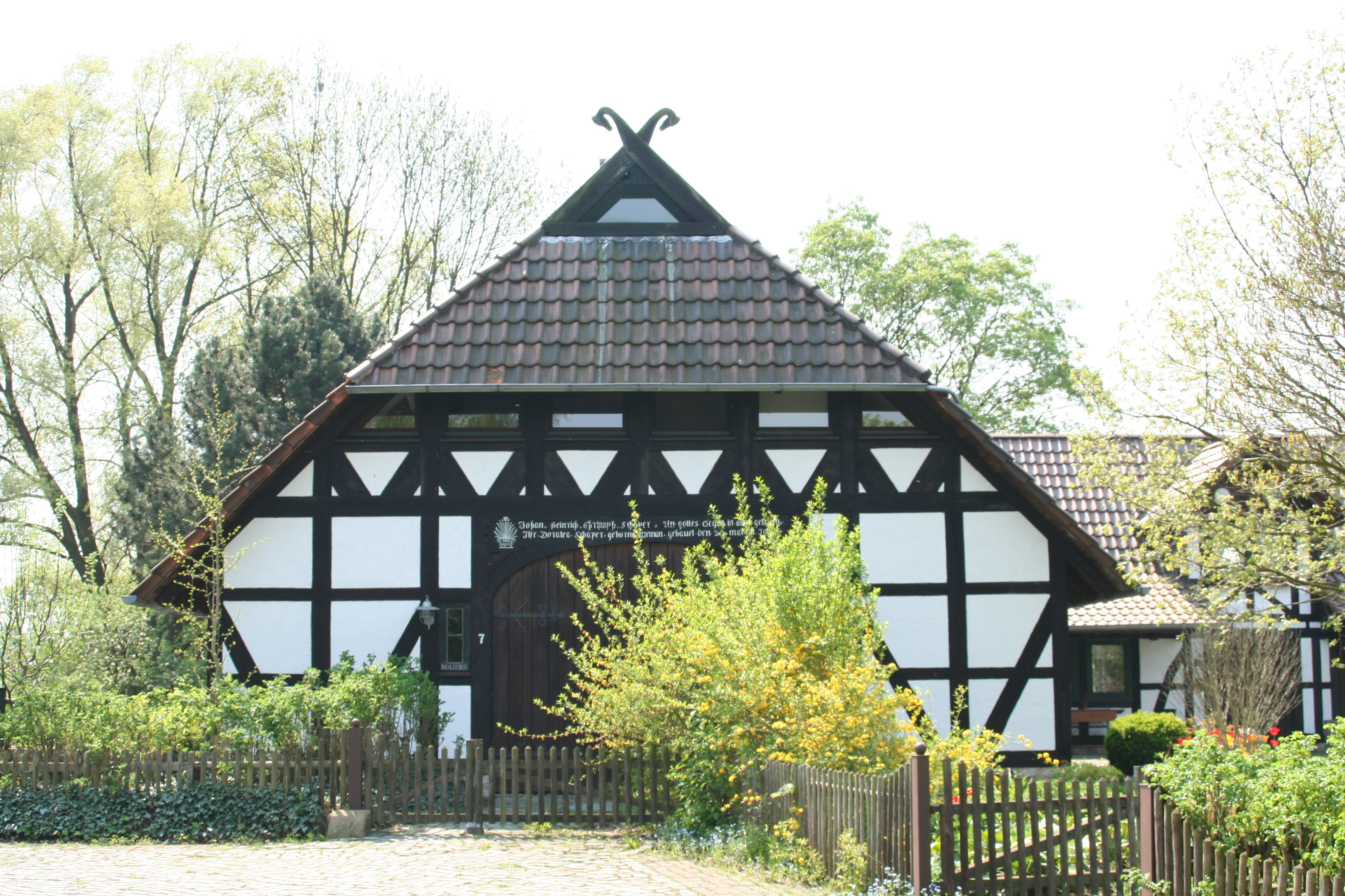 Das Hohnebostelhaus. Fachwerksiedlung Riddagshausen, Braunschweig.